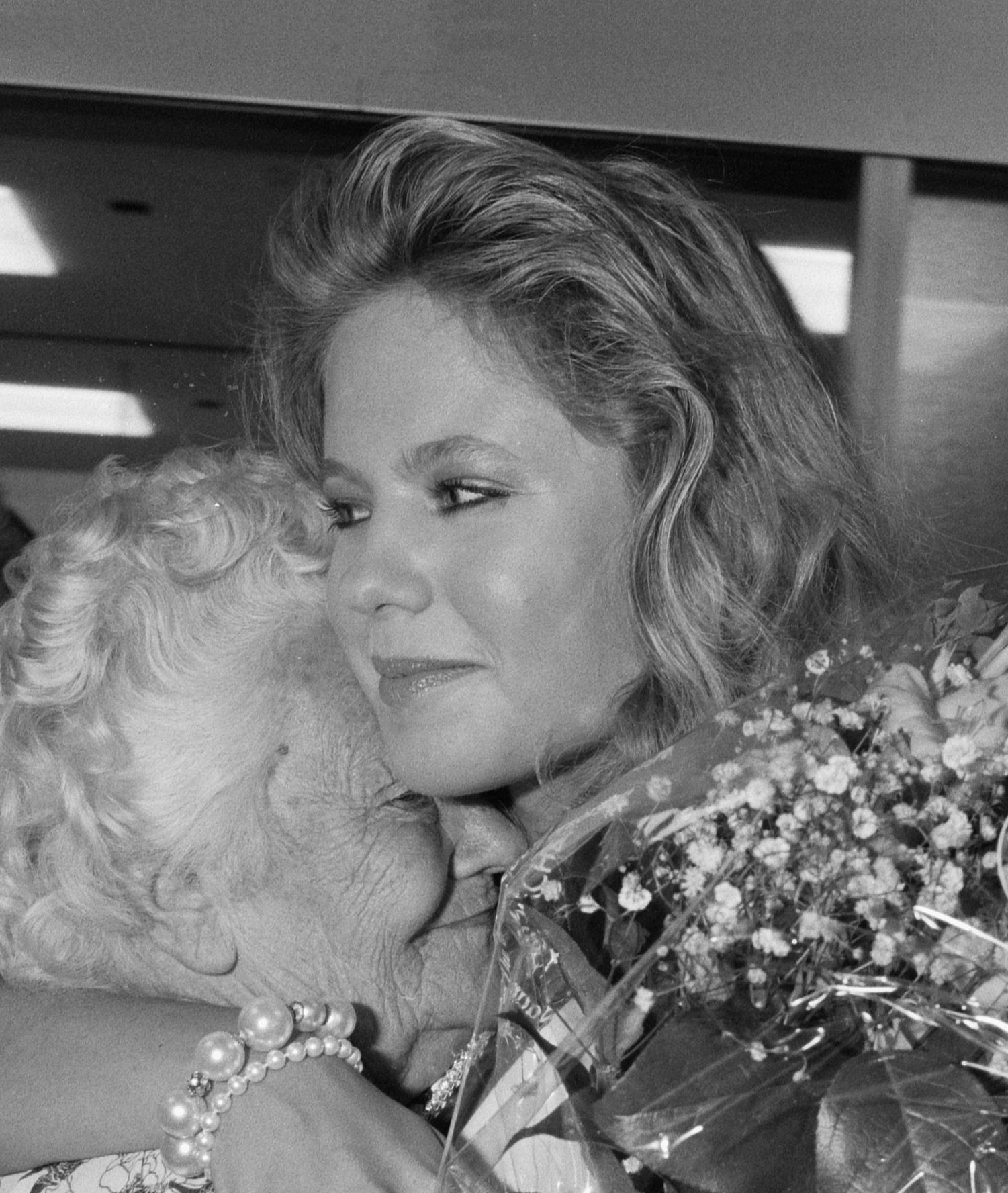 Miss Universe 1989, de Nederlandse Angela Visser, arriveert op Schiphol. Angela wordt begroet door haar oma